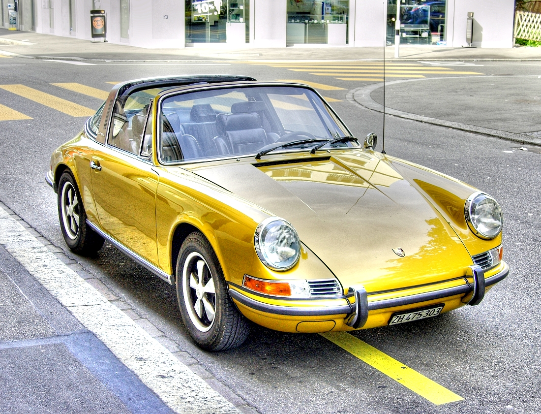 golden Porsche Targa